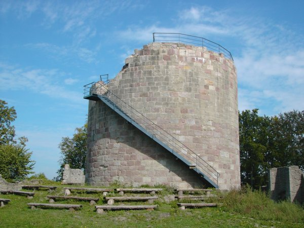 Henneburg Bergfried